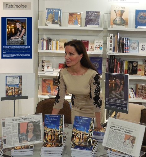 En dédicace à la Libraire du Musée du Louvre, Paris novembre 2014